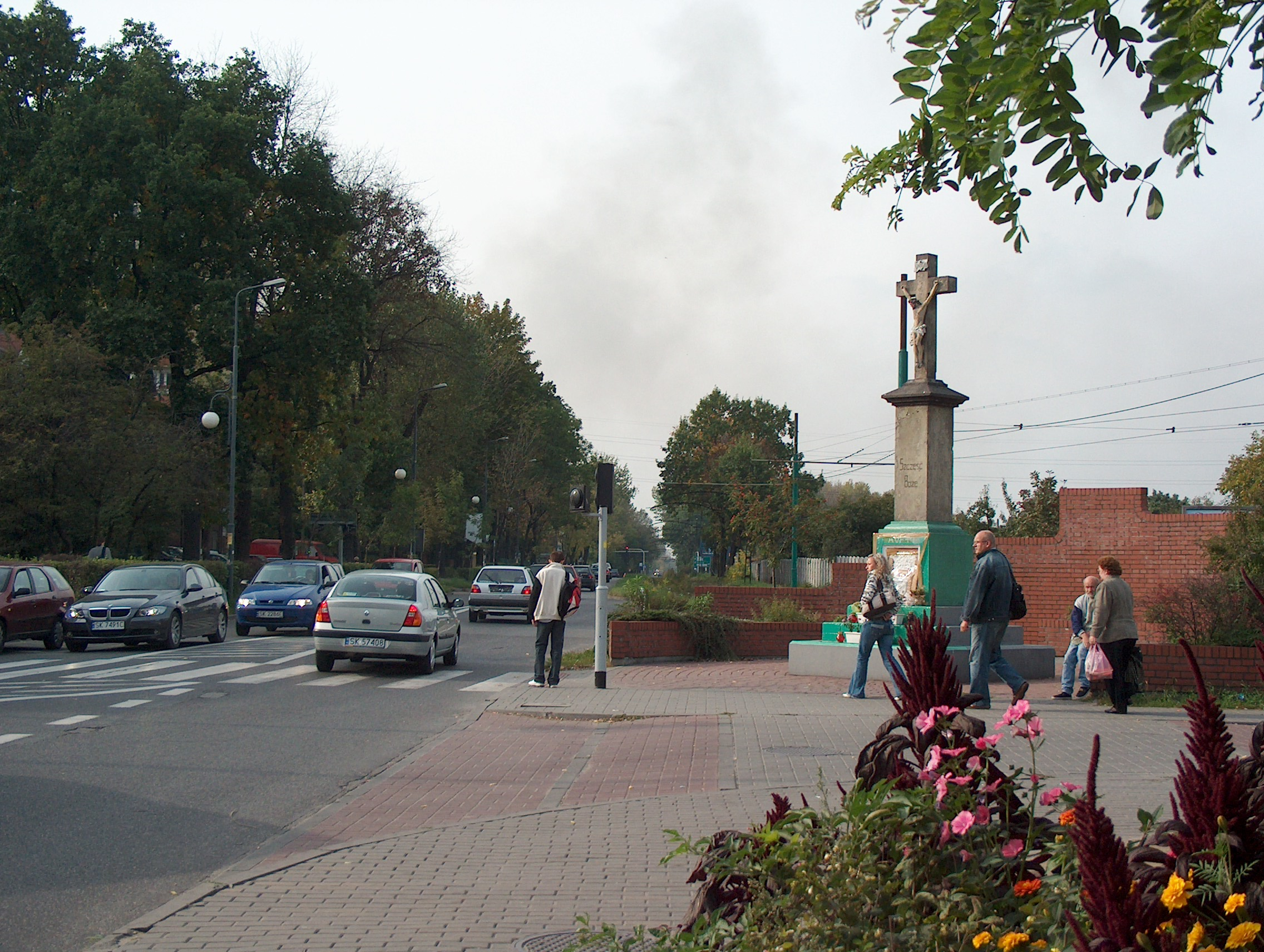 Krzyż przy skrzyżowaniu z ul. Wiśniową.